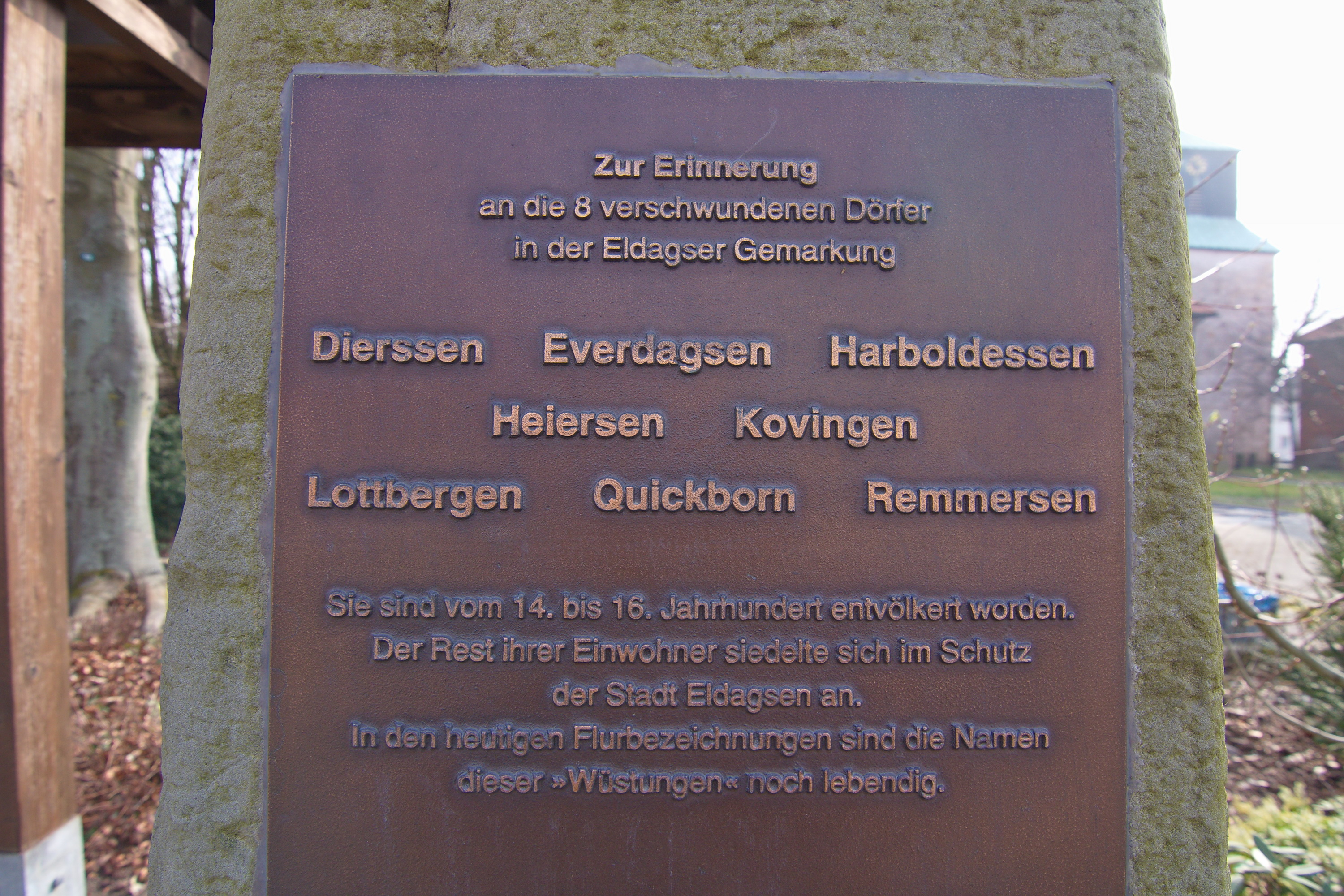 Erinnerungsmal an die 8 verschwundenen Dörfer (Wüstungen d. 14.-16. Jhd.) in der Gemarkung Eldagsen (Springe), Niedersachsen, Deutschland.